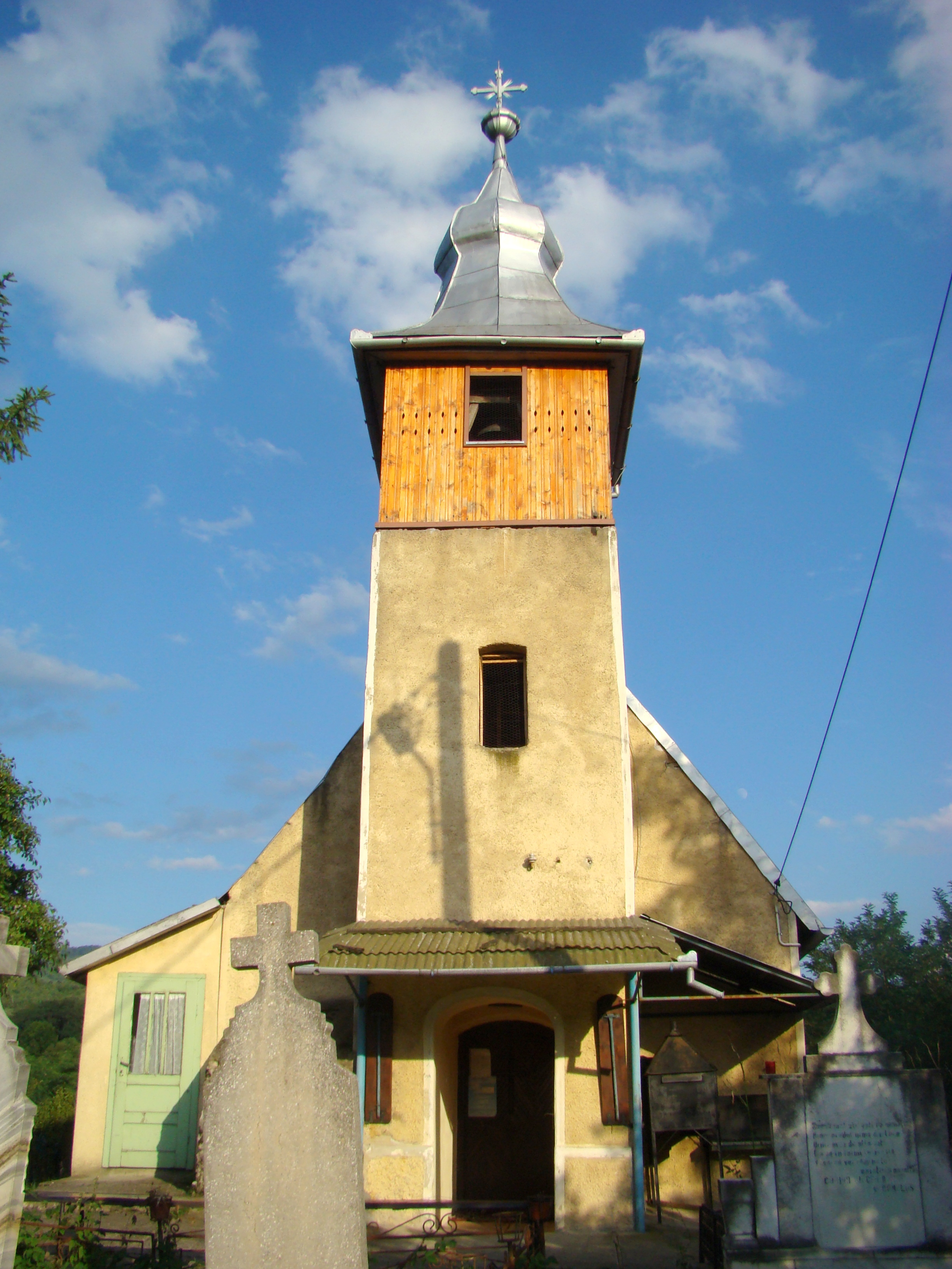 Biserica „Pogorârea Sf. Duh”, sat Ponor; comuna Pui